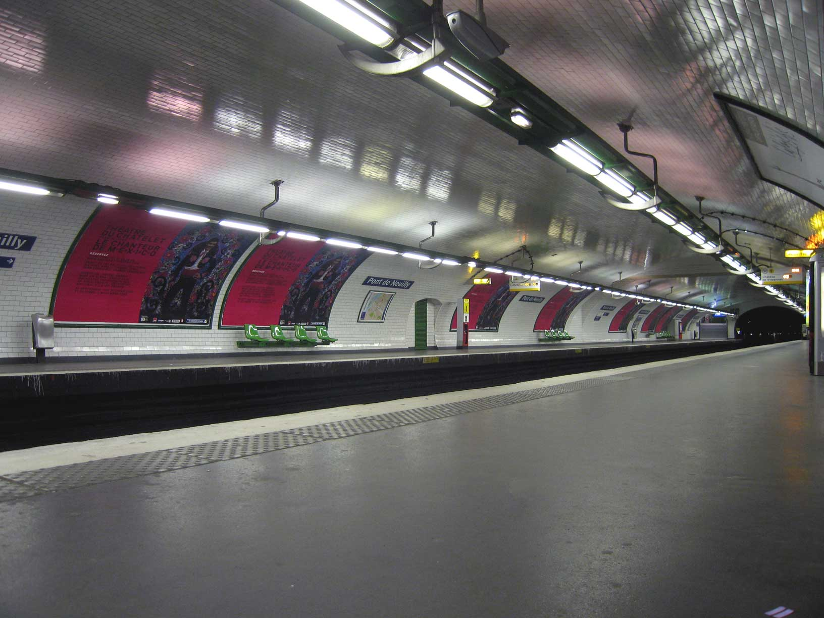 Description : Station Pont de Neuilly sur la ligne 1 Place : Paris, France Date : 2006 Author : Pline photo personnelle